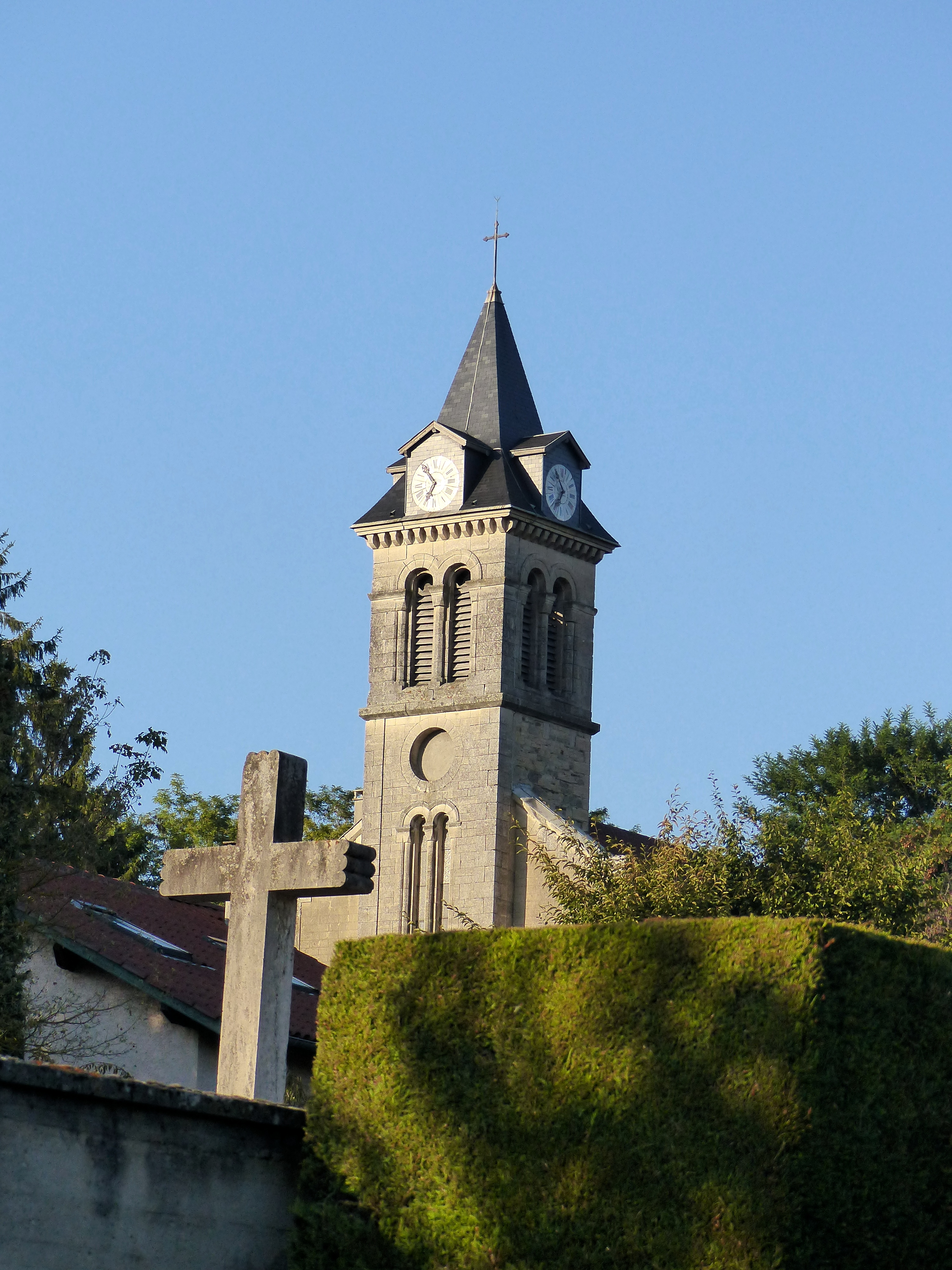 Église Saint-Pierre de Saint-Just-Chaleyssin